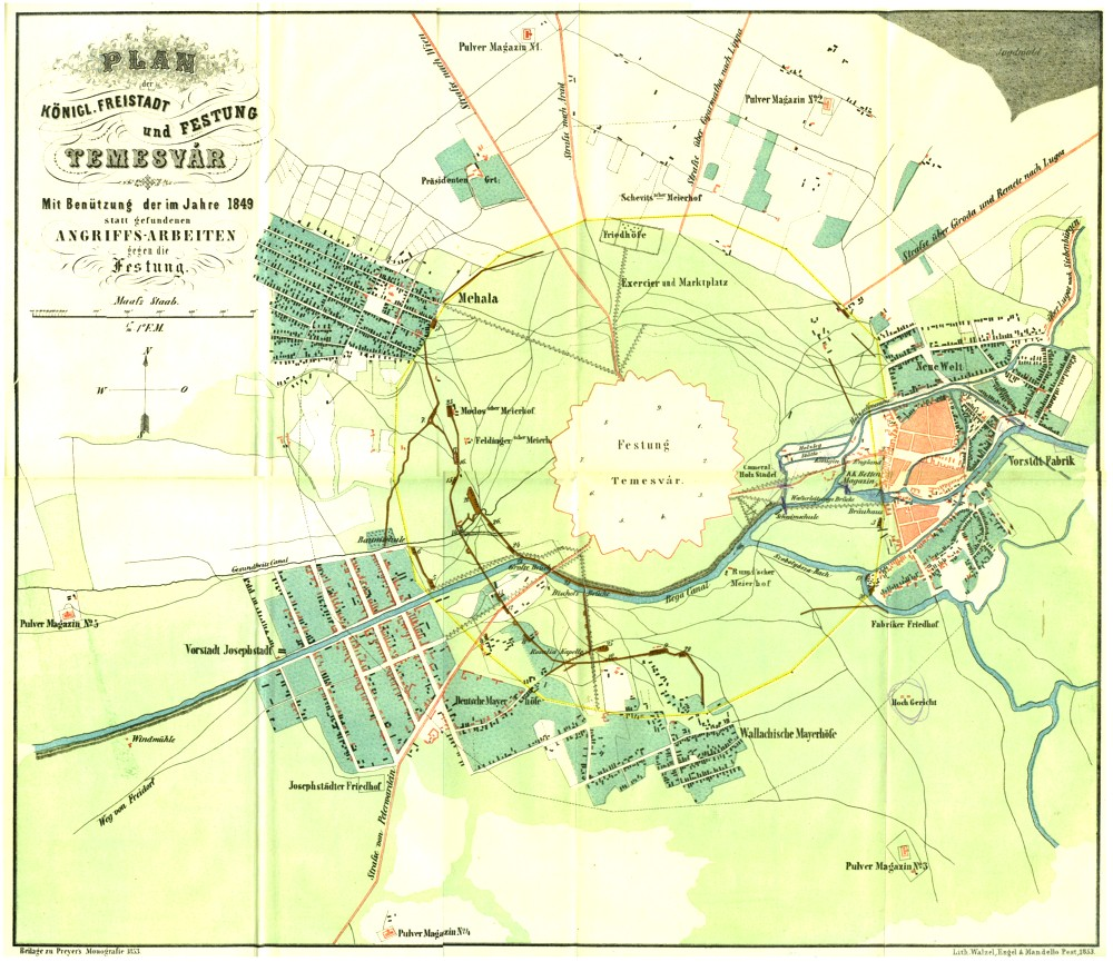 Stadtplan Temeswar 1849